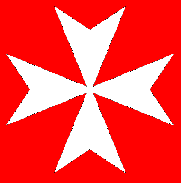 Croix_de_Malte.